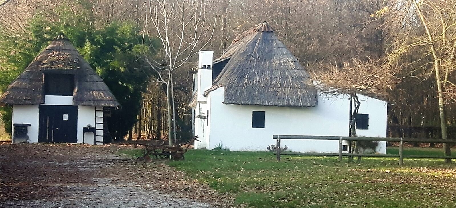 DANIELASART22. Foto del Casone situato in via Ramei a Piove di Sacco (Padova), scatta il 17/12/2016.